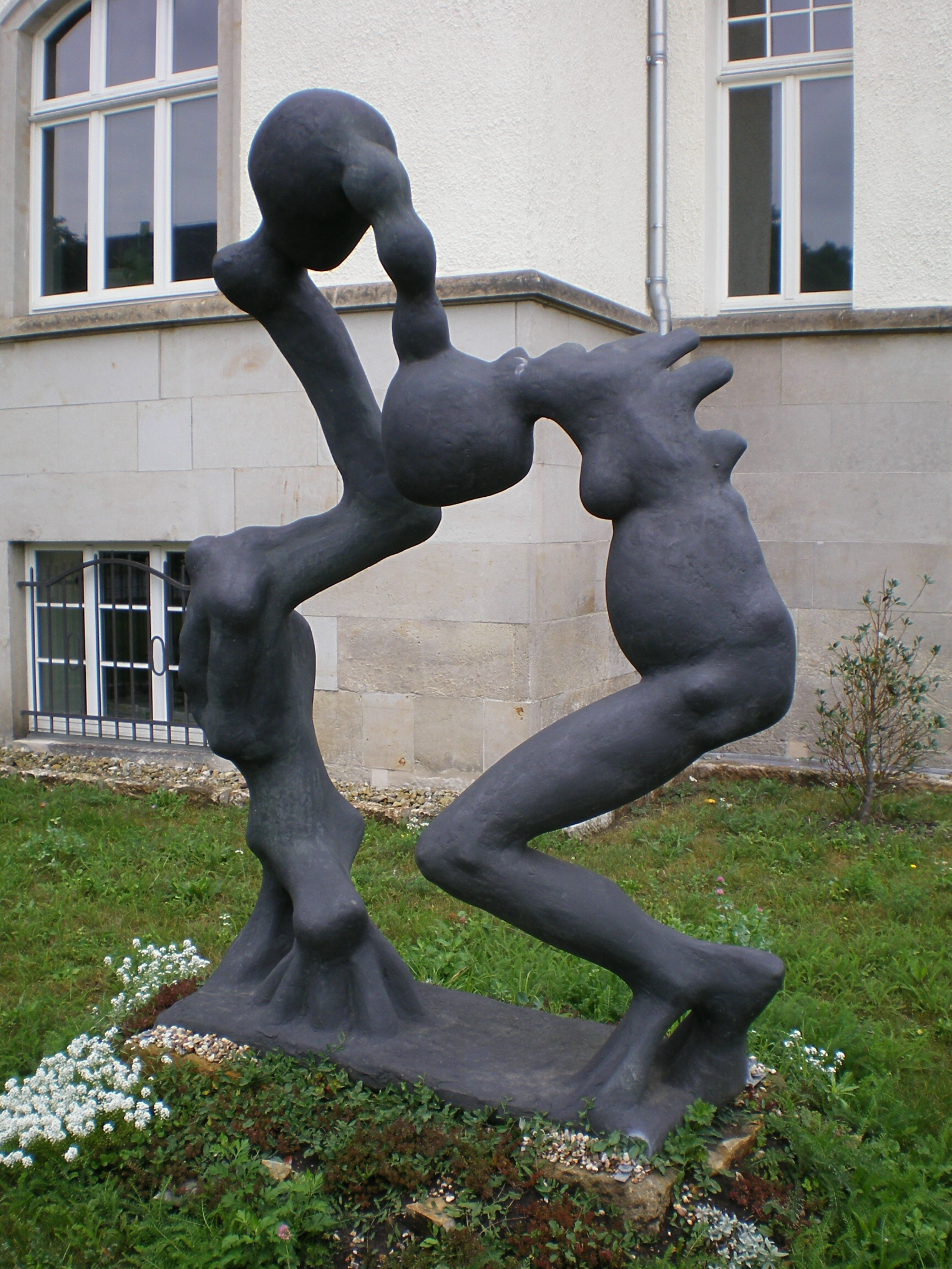 Eißner, Ulrich - 2005 Skulptur Zweierbeziehung aus Polymerbeton am Fritz-Foerster-Platz bei Saxonia-Systems in Dresden.